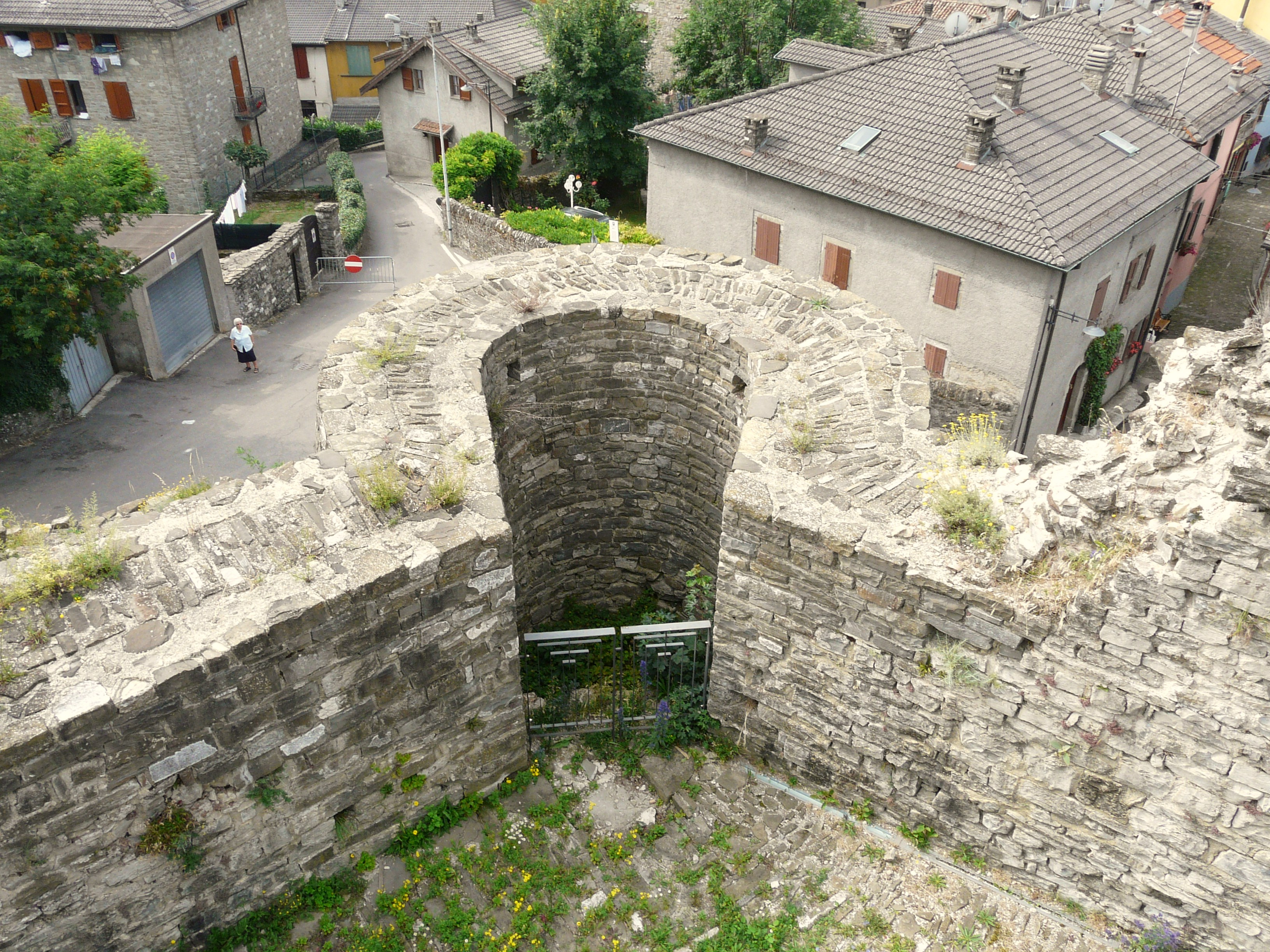 Ruderi del castello di Berceto, Emilia Romagna, Italia